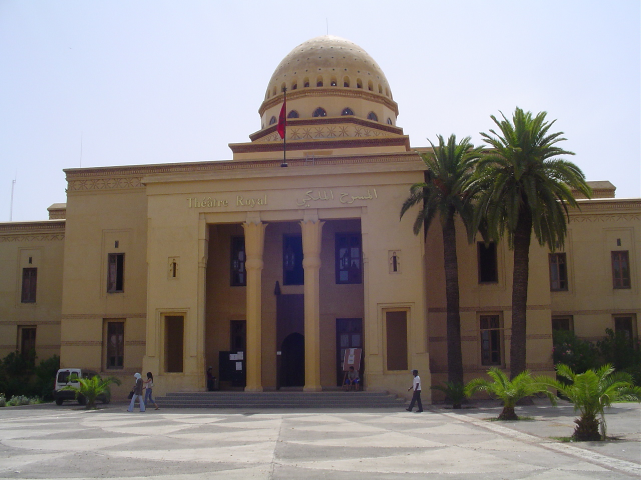 Gueliz Marrakech